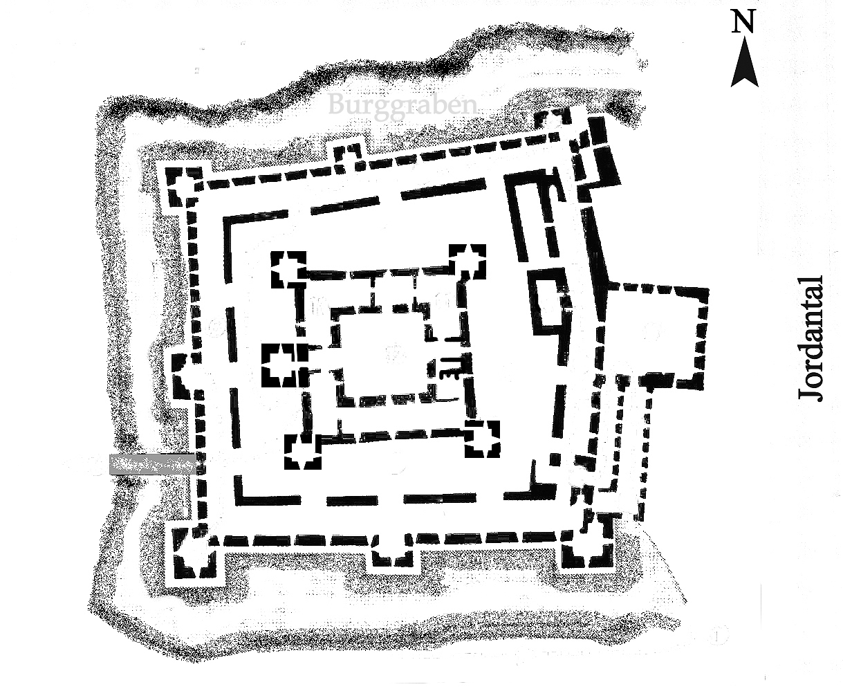 Grundriss der Burganlage Belvoir